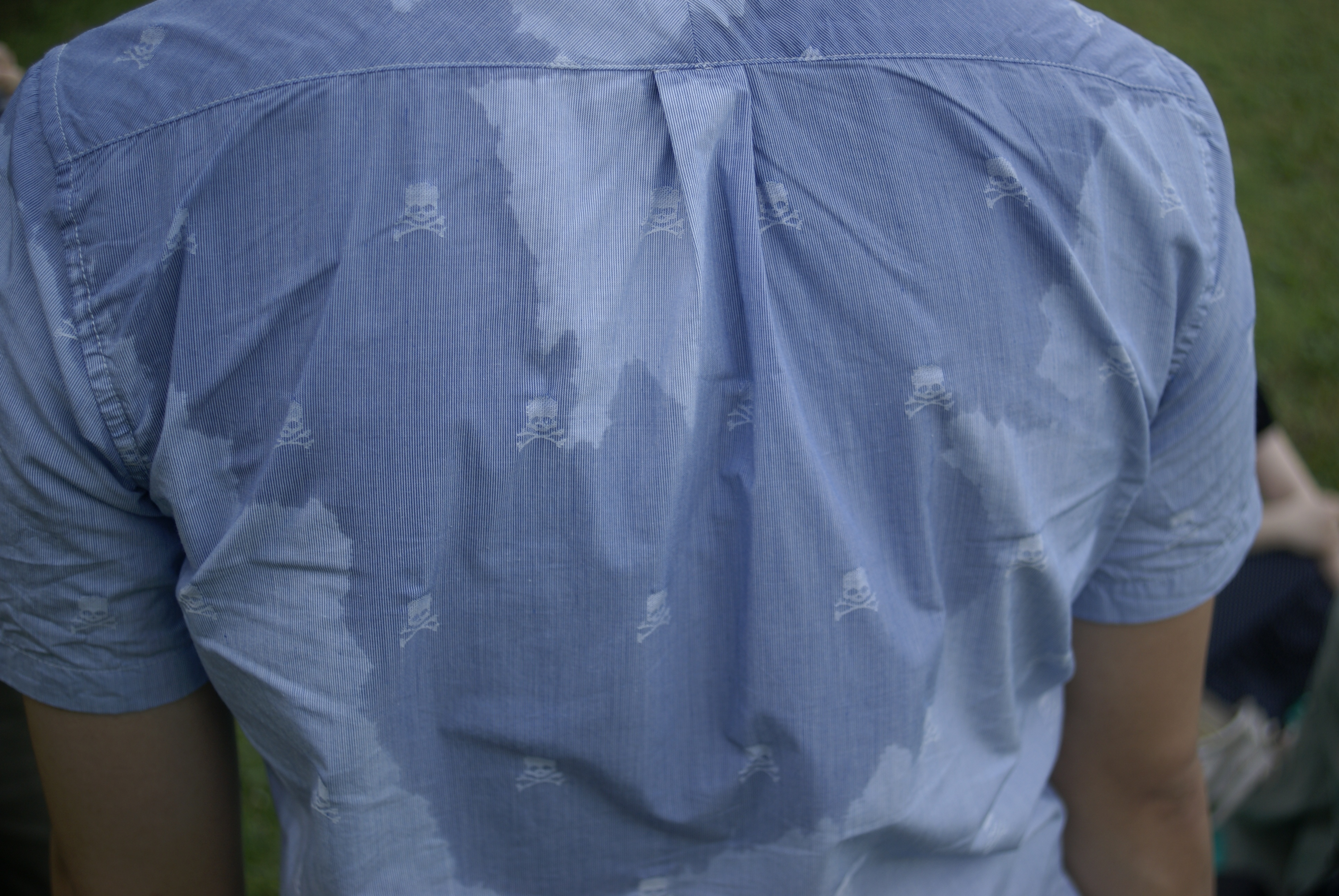 みんなが楽しめたのはこの汗のおかげなのです